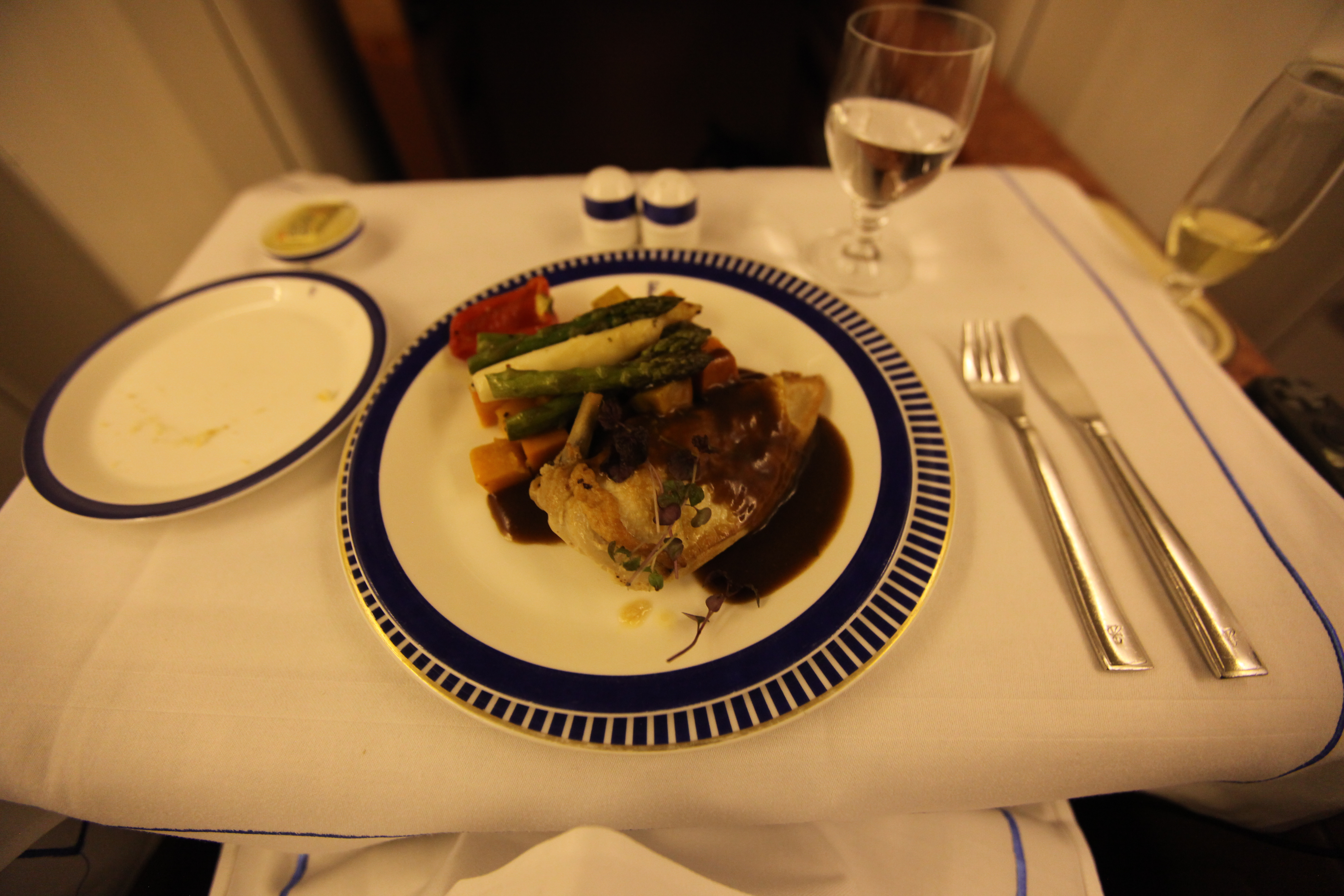 SQ 747